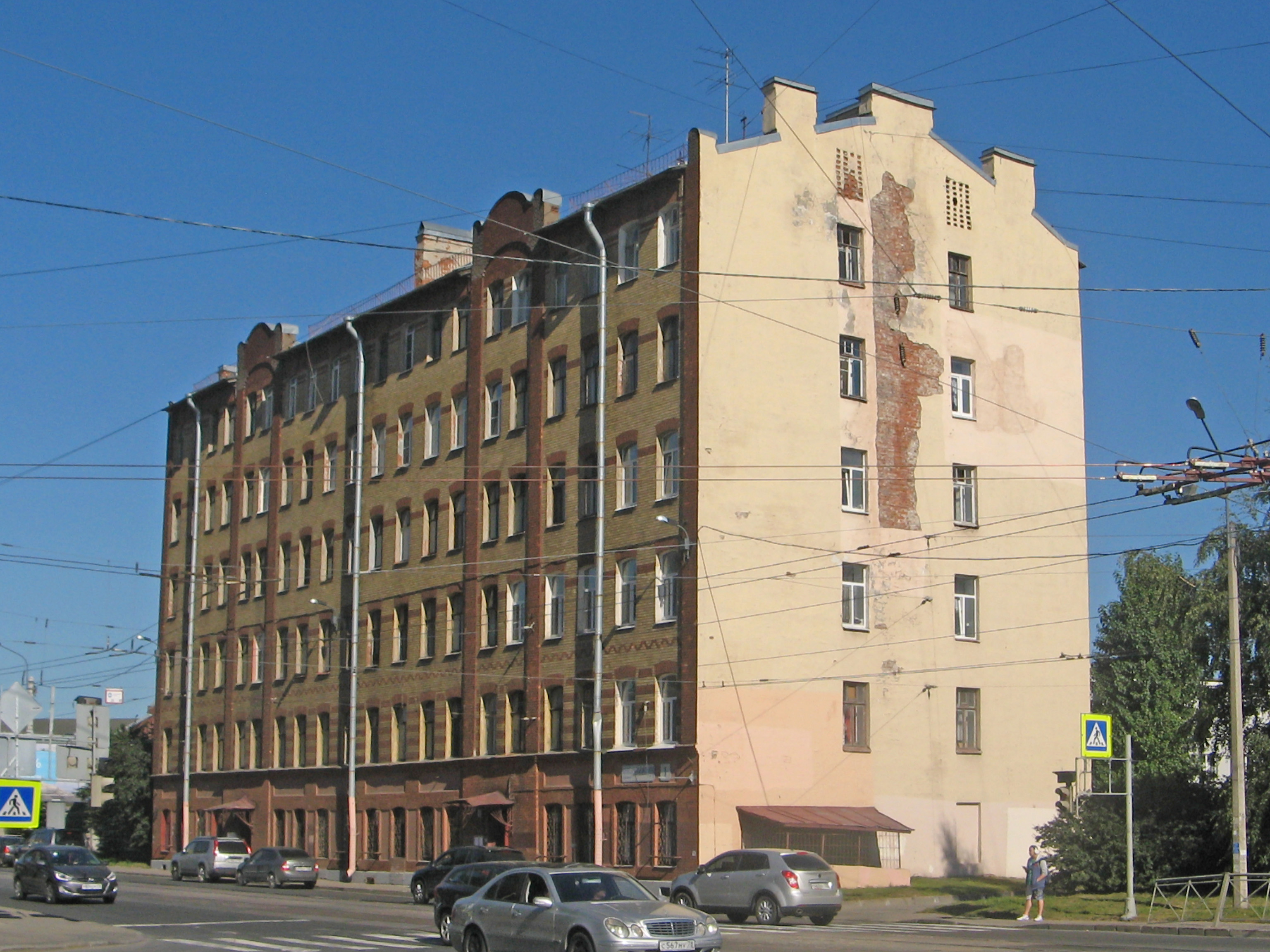 Санкт-Петербург, Кондратьевский проспект, д. № 1. Доходный дом А. И. Пшонкина